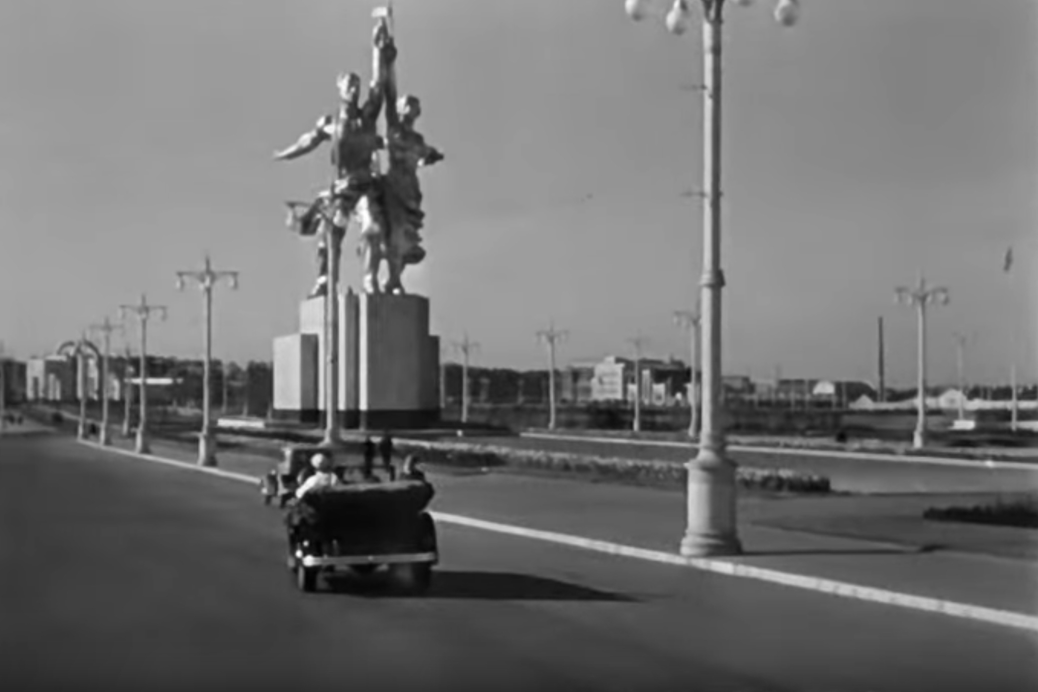 «Подкидыш» — художественный фильм производства киностудии «Мосфильм» 1939 года. Один из самых первых семейных фильмов в Советском Союзе, сценаристами которого стали актриса Рина Зелёная и писательница Агния Барто. Вид на памятник «Рабочий и колхозница» Веры Мухиной и арка центрального входа на выставку ВСХВ.